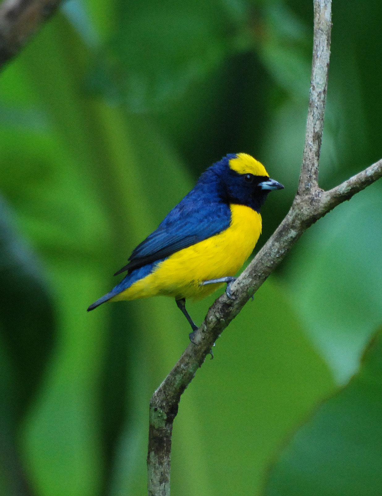 Yellow-crowned Euphonia at Selva Verde Lodge, Costa Rica, 080225. Euphonia luteicapilla.